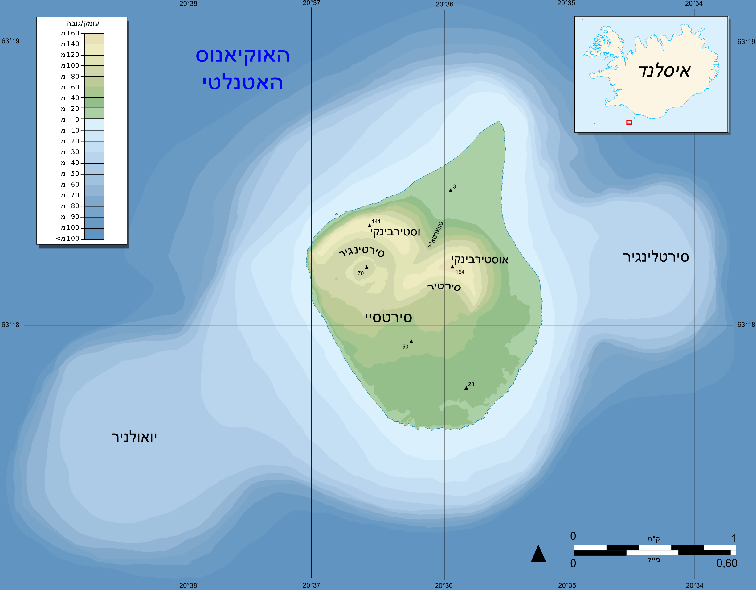 גרסה עברית למקור